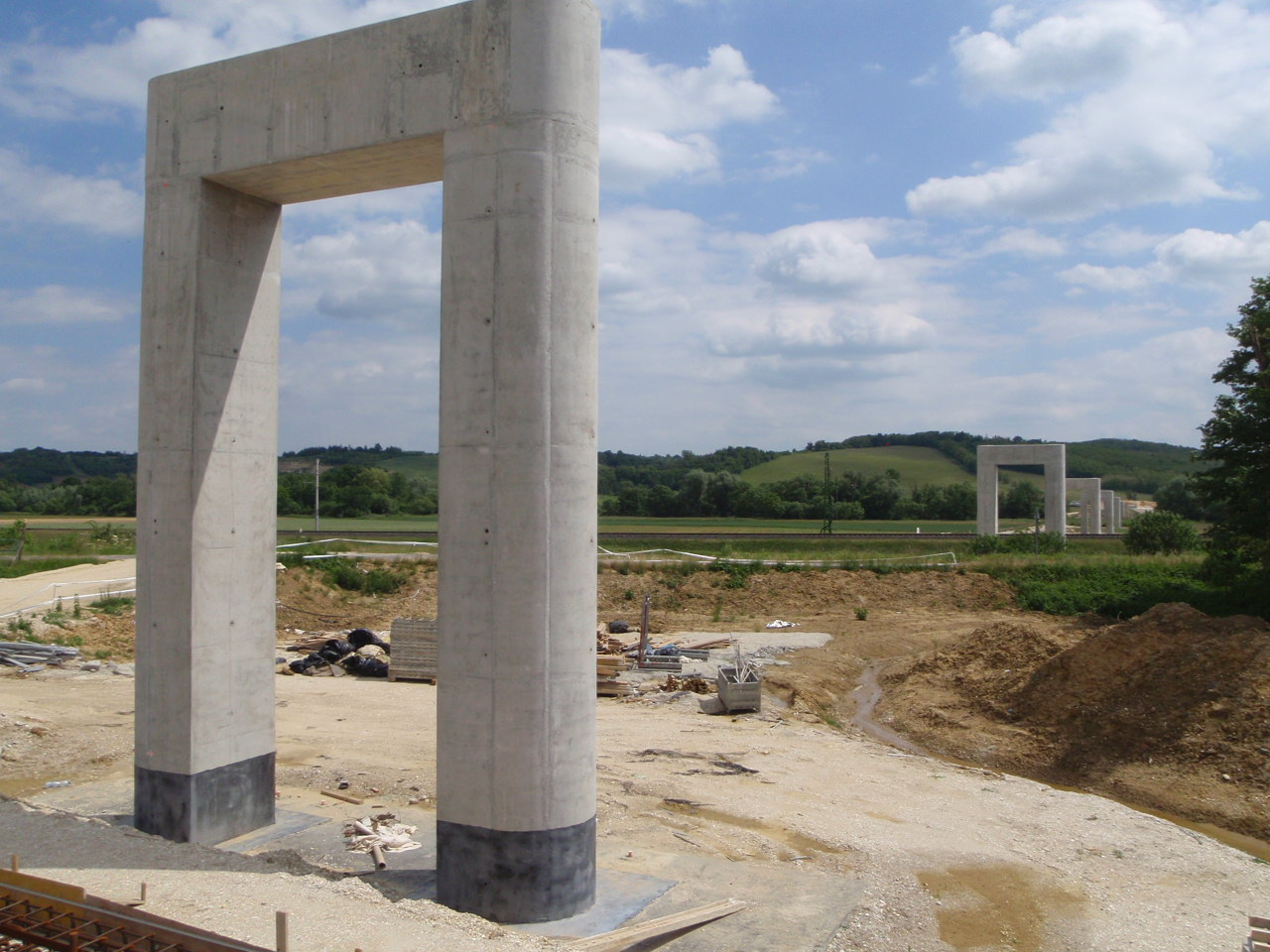 Épülő Zalalövő völgyhíd 2015_05